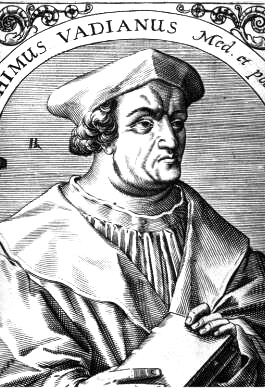 Beschreibung: Stich von Joachim von Watt (Vadian) (aus dem de:19. Jahrhundert) Quelle: Bildarchiv der Österreichischen Nationalbibliothek in Wien Copyright Status: Public Domain